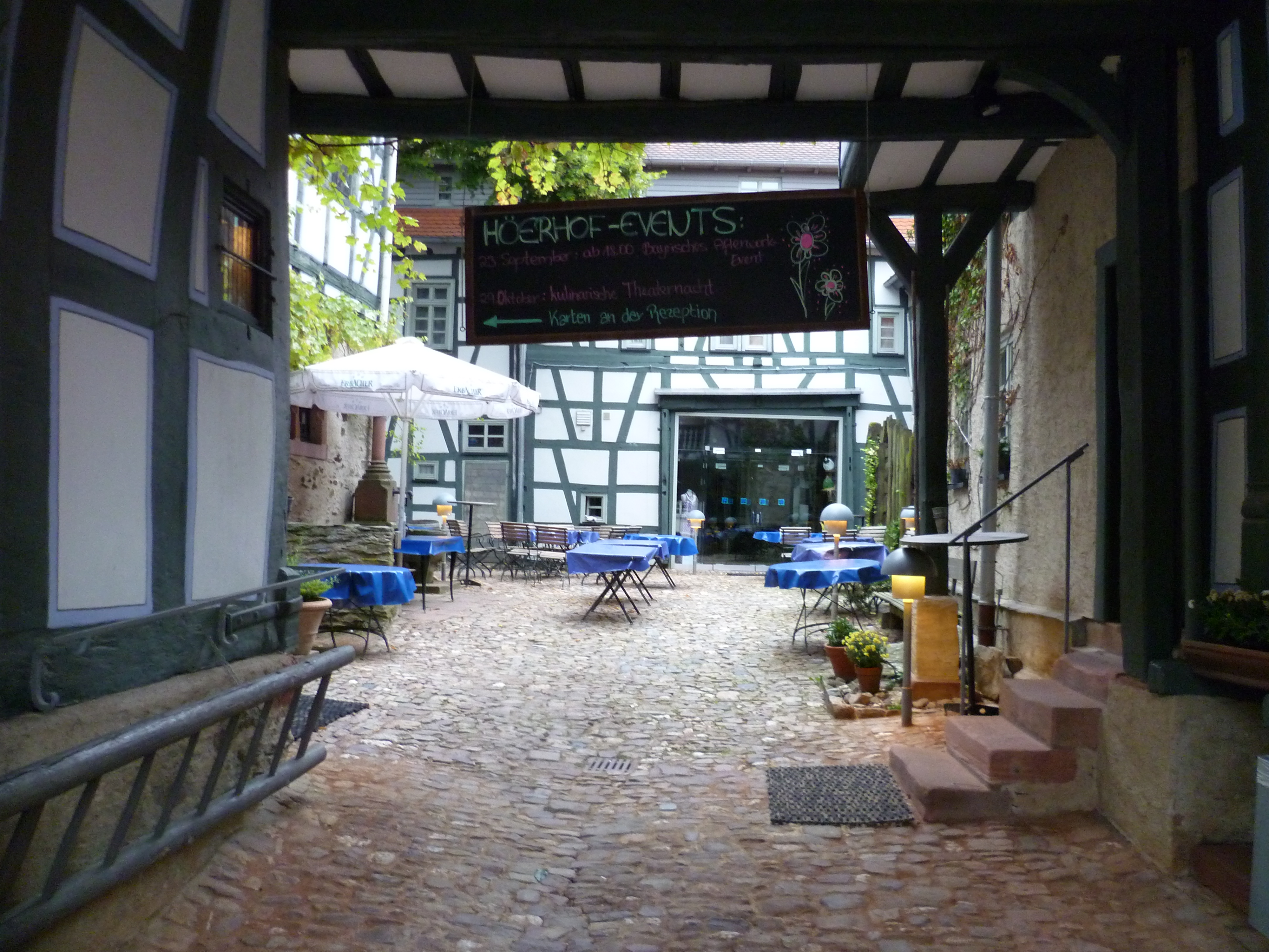 Der Innenhof des Höerhofs in Idstein